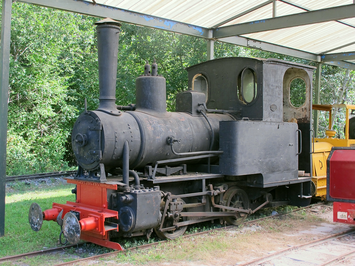 La 020T Orenstein & Koppel No. 2649 construite en 1908 et préservée au Tacot des Lacs (Seine-et-Marne).